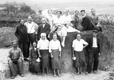 Володимирівка (Новоархангельський район), Кіровоградська область Т.С.Пассек серед учасників Трипільської експедиції в с.Володимирівка на р.Синюха